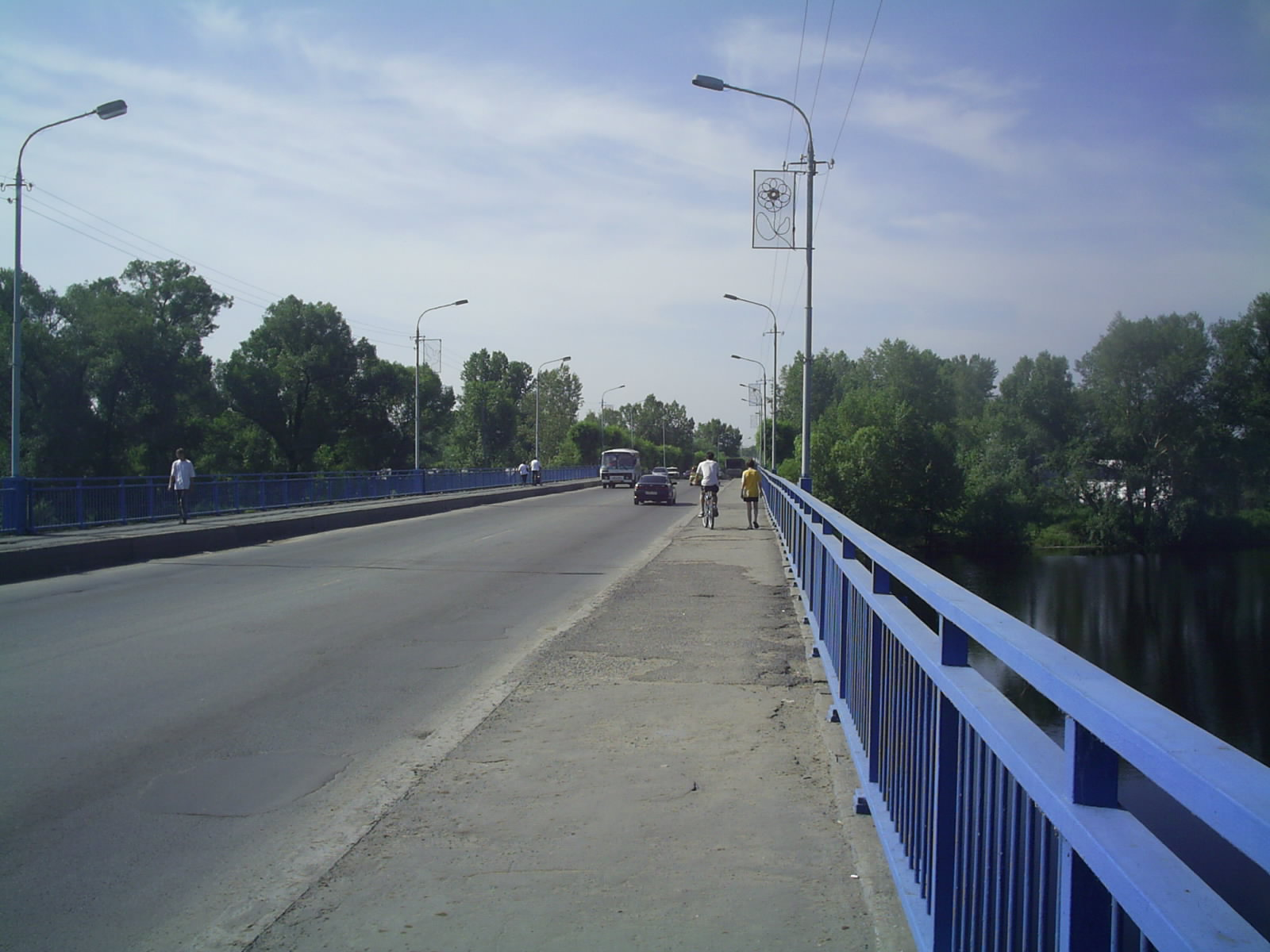 Мост через протоку реки Енисей